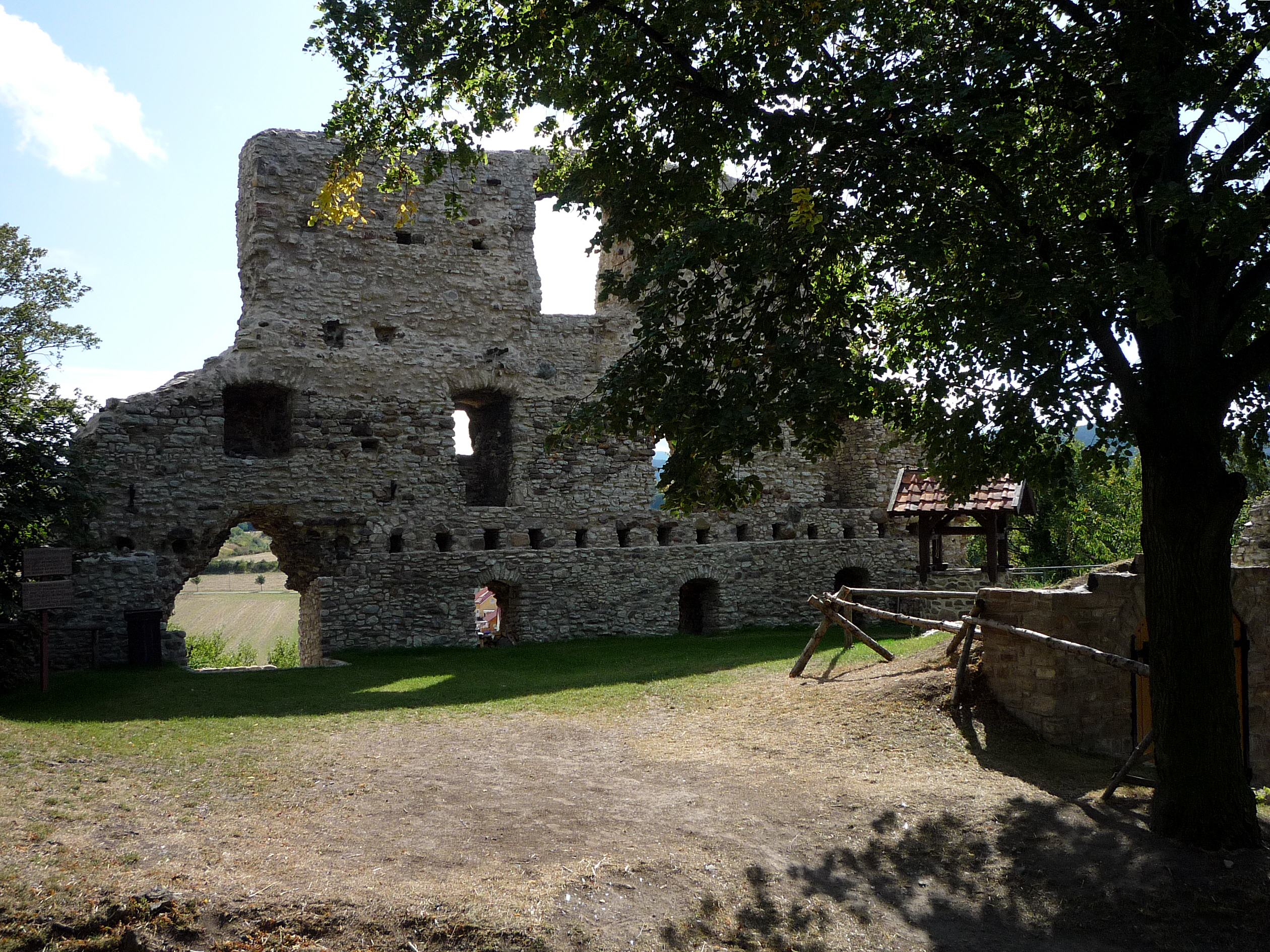 Die Stapelburg wurde zu Beginn des 12. Jahrhunderts von Adalbert Graf zu Wernigerode errichtet. Zwei Jahrhunderte lang diente sie als Zollstelle. Ab Mitte des 18. Jahrhunderts begann der Zerfall der Burg. In DDR-Zeiten wurde die Burg gewollt ihrem weiteren Verfall überlassen. Frühere Namen der Burg: 1306 "Slot Stapelborch", 1470 "Stapelnborch" und später "Stapenborch".